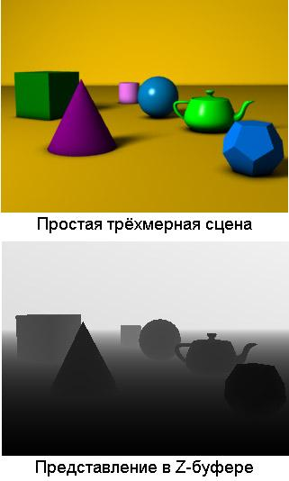 Иллюстрация работы Z-буфера. Адаптировано из англоязычной Википедии, автор — User:T-tus